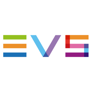 EVS Broadcast Equipment logo